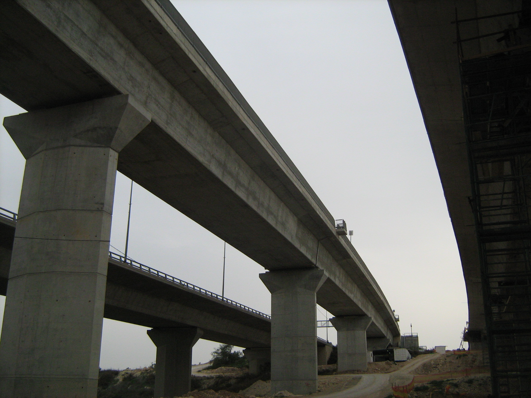 כביש 431 מעל נחל ענבה